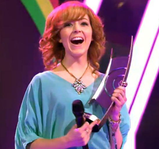 Lindsey Stirling odbiera nagrodę na gali Echo Awards 2014 w Berlinie.